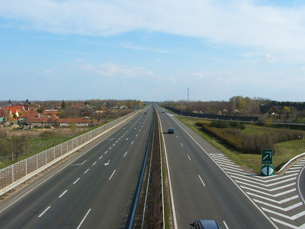 Kecskemét-Nyugat csomópont, az 52-es út felüljárója. A képen Szeged felé nézünk.